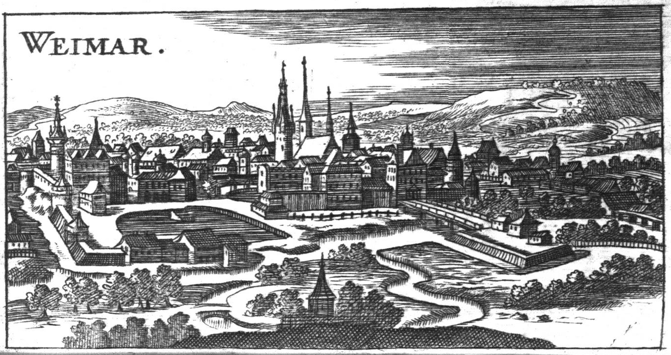 Engraving of Weimar published by Christoph Riegel, active in Nuremberg between 1678 and 1714, from Der getreue Reiß-Gefert durch Ober- und Nieder-Teutschland